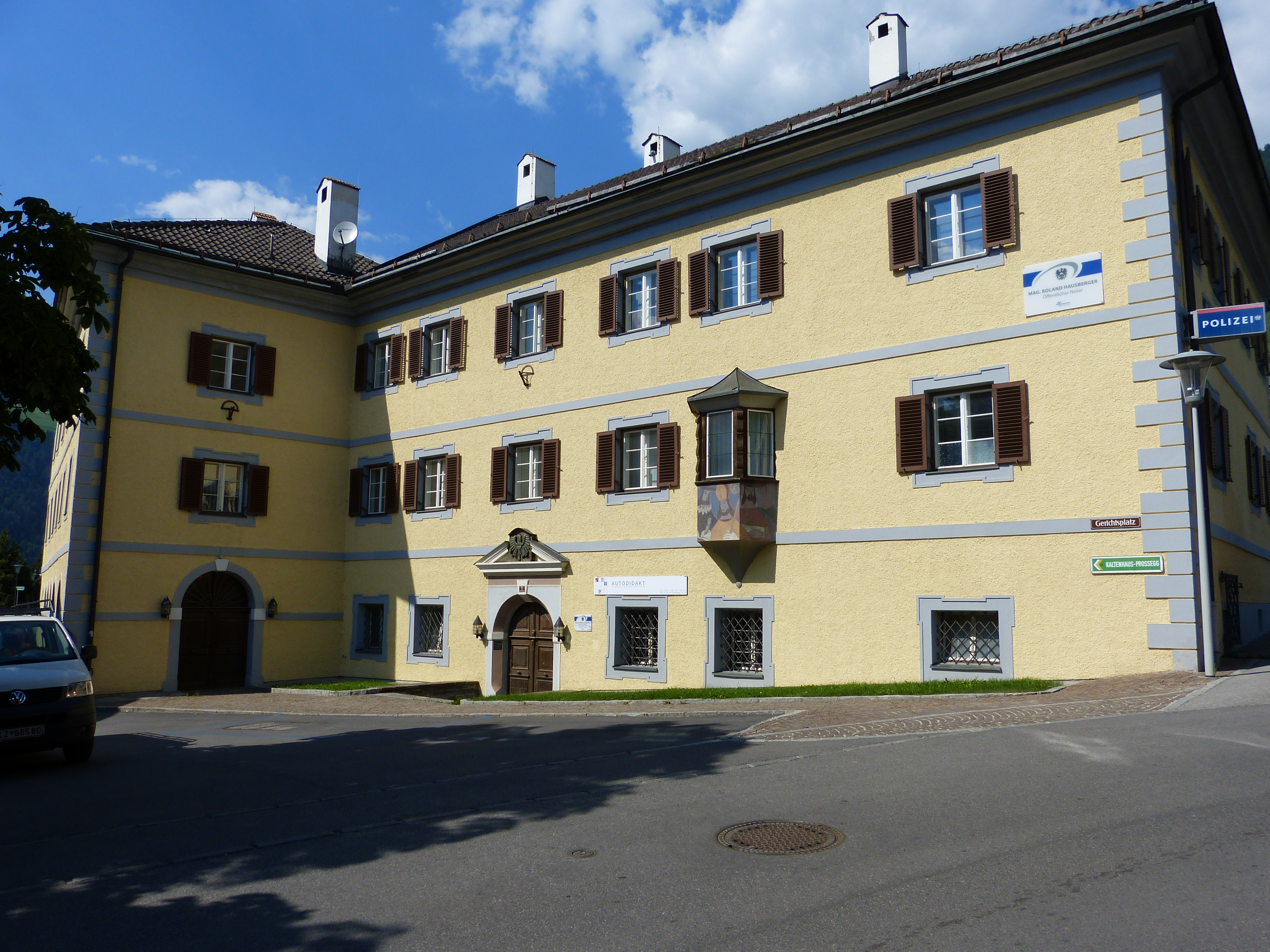 Ehemaliges Gerichtsgebäude Matrei in Osttirol Denkmalgeschütztes Gebäude in Gemeinde Matrei in Osttirol, Bezirk Lienz, Tirol, Österreich The making of this work was supported by Wikimedia Austria. For other files made with the support of Wikimedia Austria, please see the category Supported by Wikimedia Österreich.